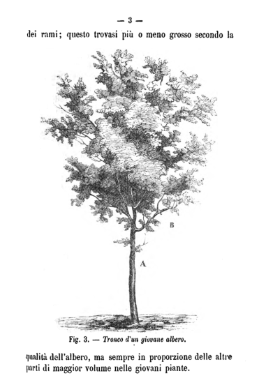 Albero. Dal volume "Corso teorico-pratico sopra la coltivazione e potatura delle principali piante fruttifere" dei fratelli Marcellino e Pietro Giuseppe Roda, 3a ed., 1869.